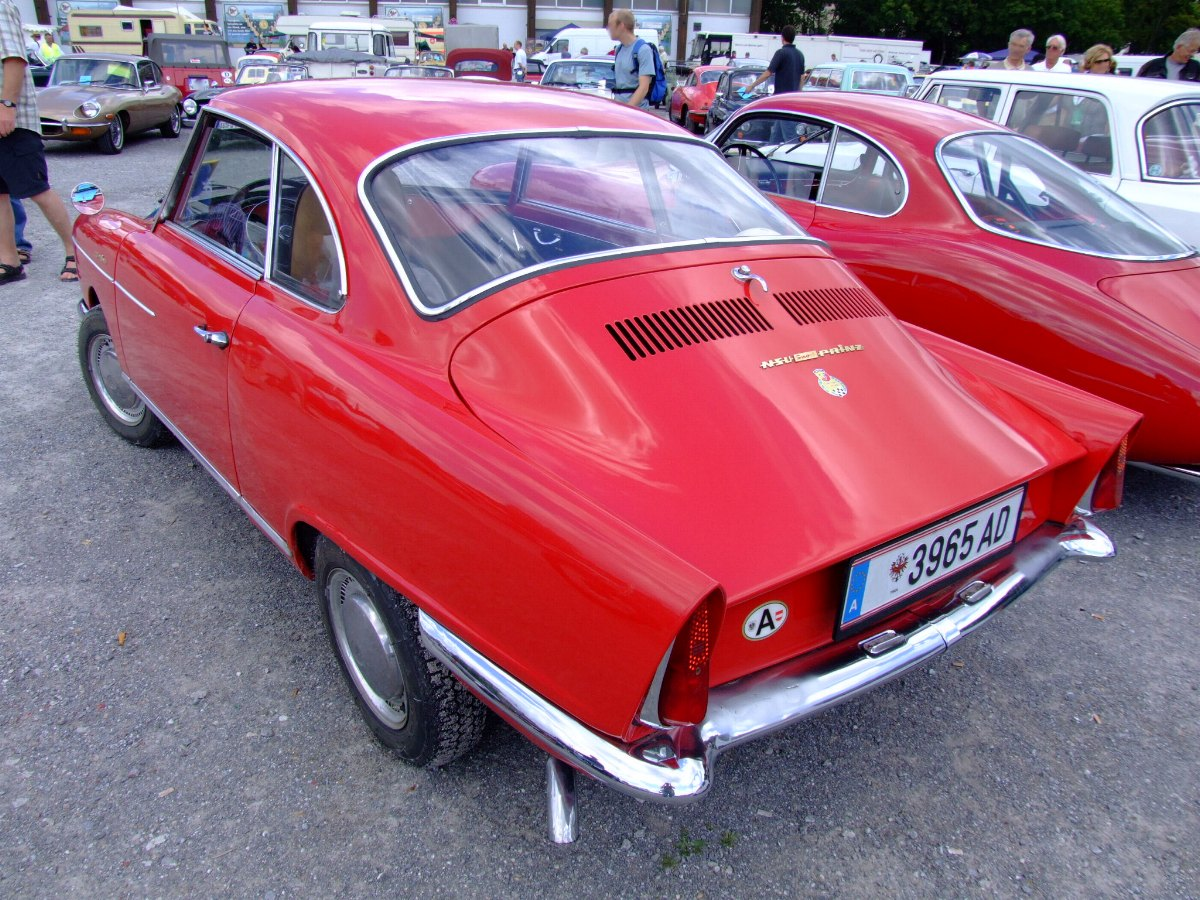 NSU SportPrinz